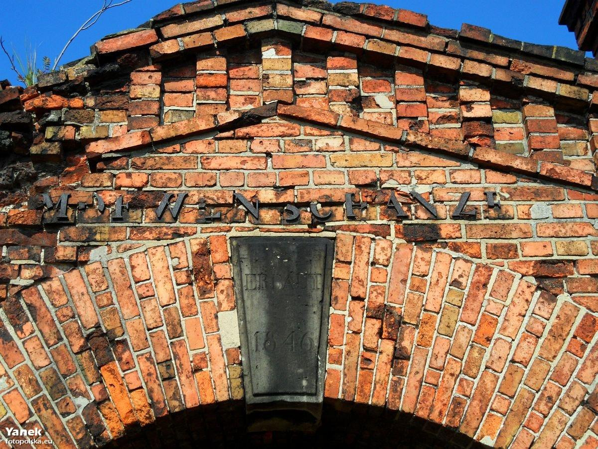 Wejście do Mewiego Szańca